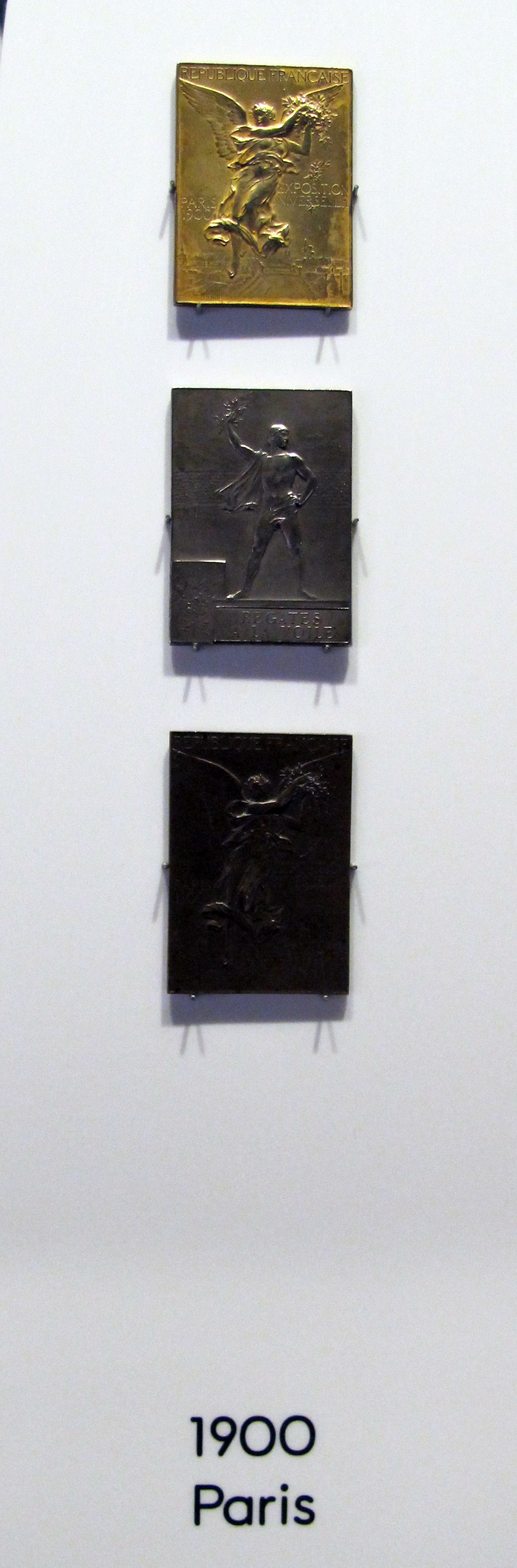 Musée Olympique, Losanna